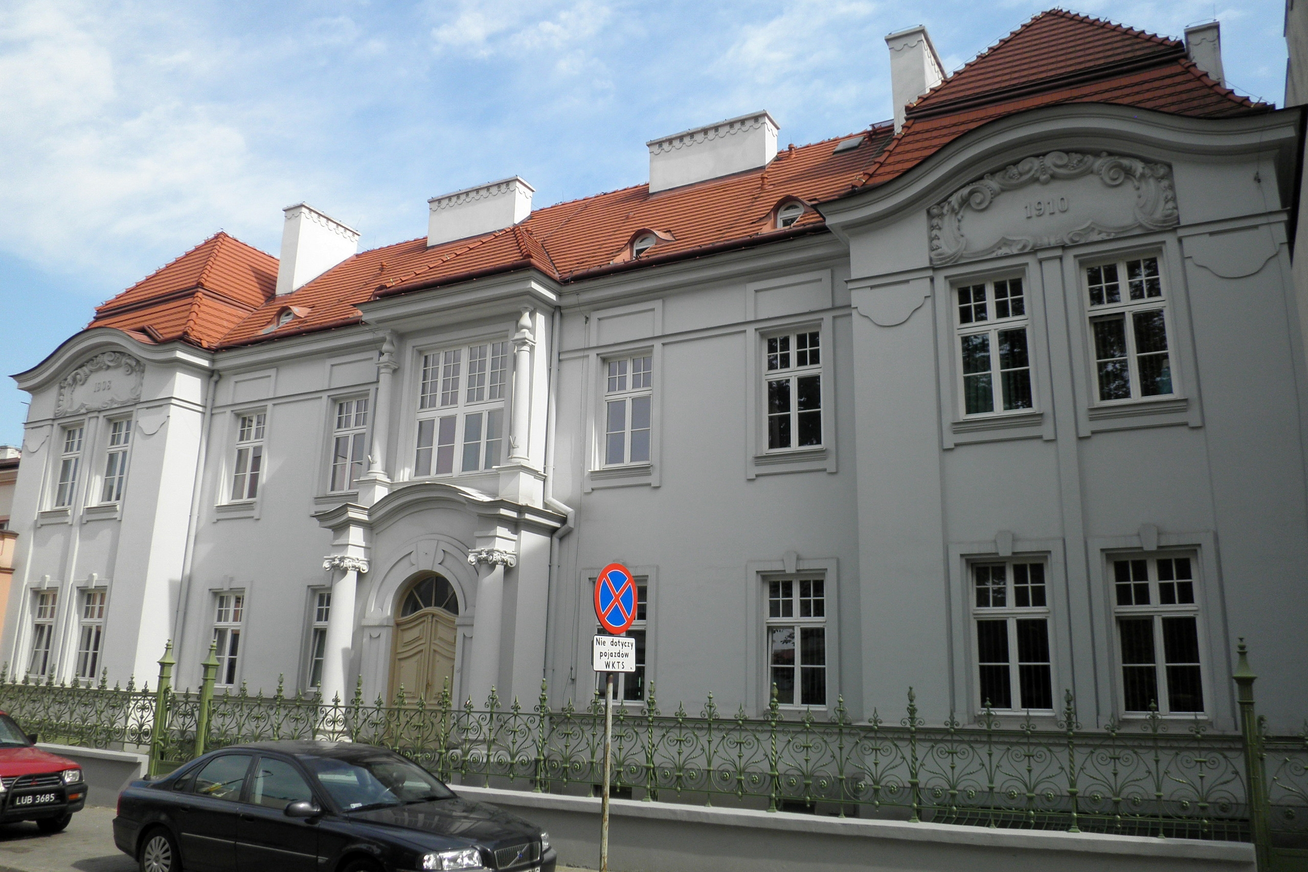 Szpital przy ul. Staszica 11 w Lublinie